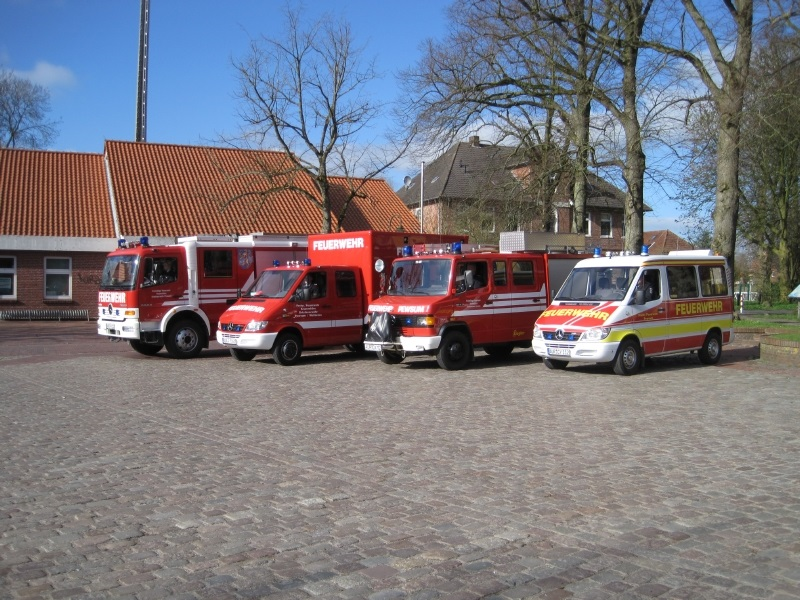 Der Fuhrpark umfasst heute ein Tanklöschfahrzeug (TLF 16/25), ein Löschgruppenfahrzeug (LF 8/8), ein Gerätewagen-Logistik (GWL) und ein Mannschaftstransportfahrzeug (MTF). Diese Feuerwehrfahrzeuge sind in Pewsum stationiert.